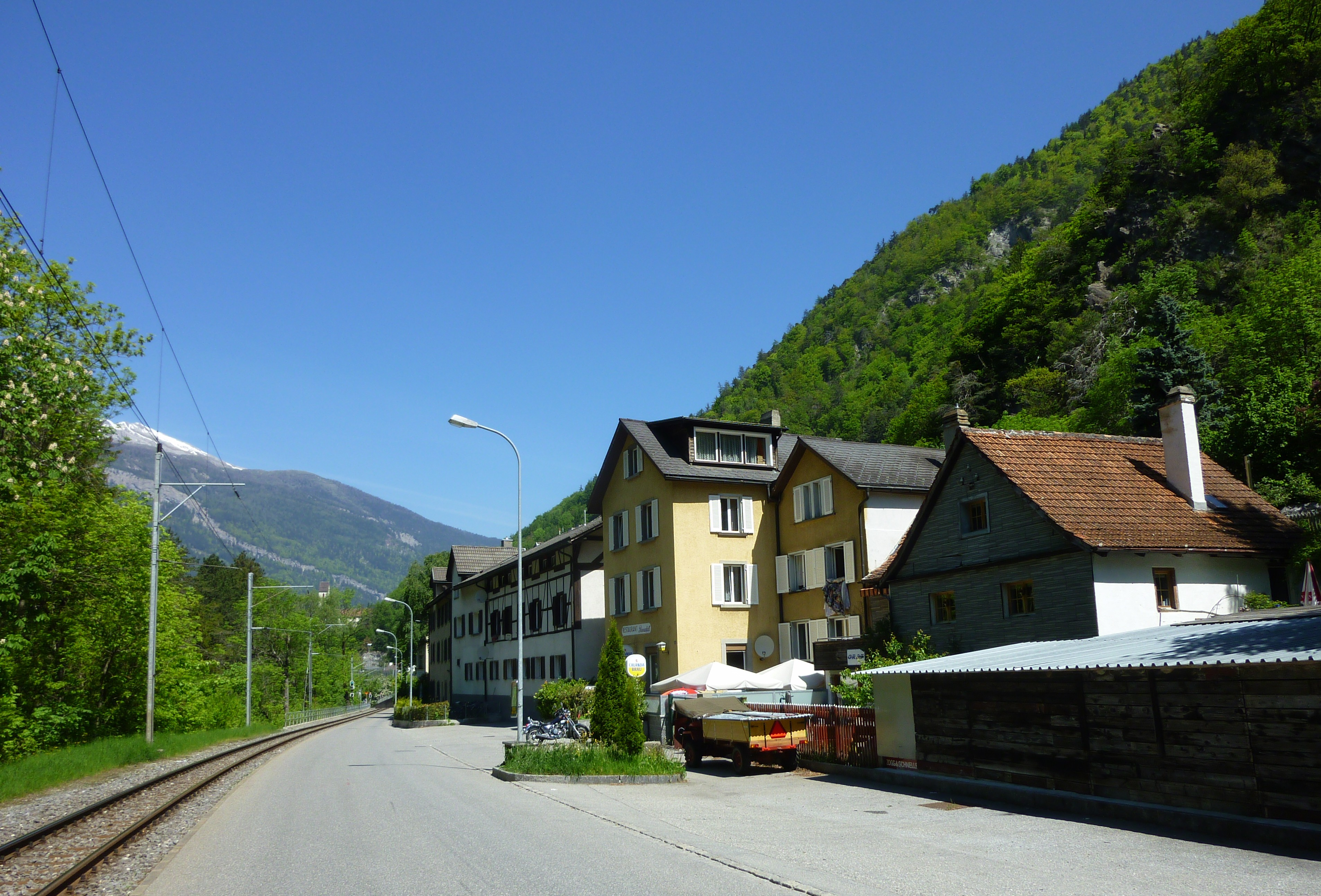 Restaurant Plessurfall im Churer Quartier Sand